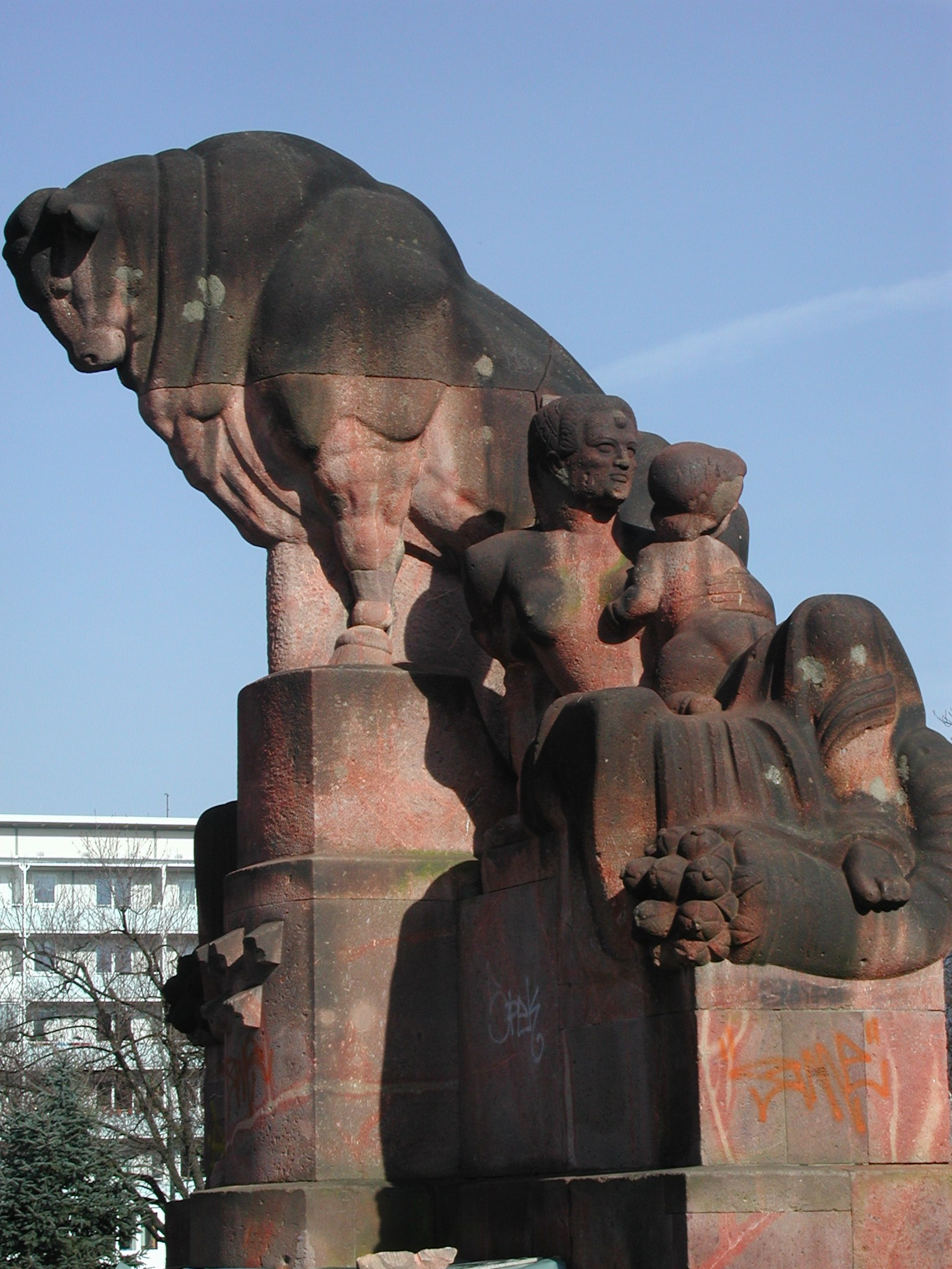 Stier mit Mutter und Kind